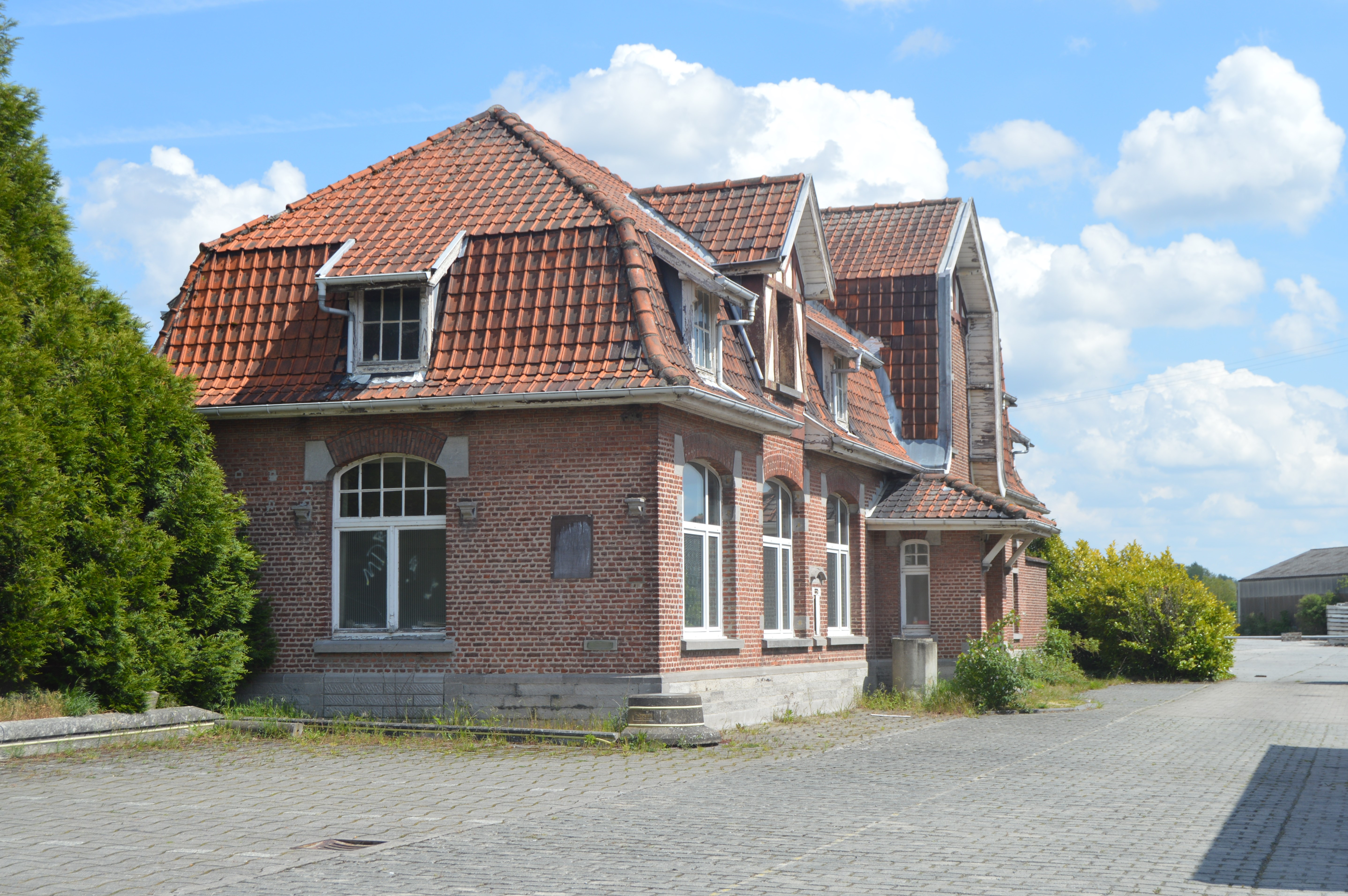 Gare d'Ollignies vue depuis l'ancienne place de la gare.La fenêtre au centre du mur latéral remplace la porte utilisée pour les colis et petites marchandises.